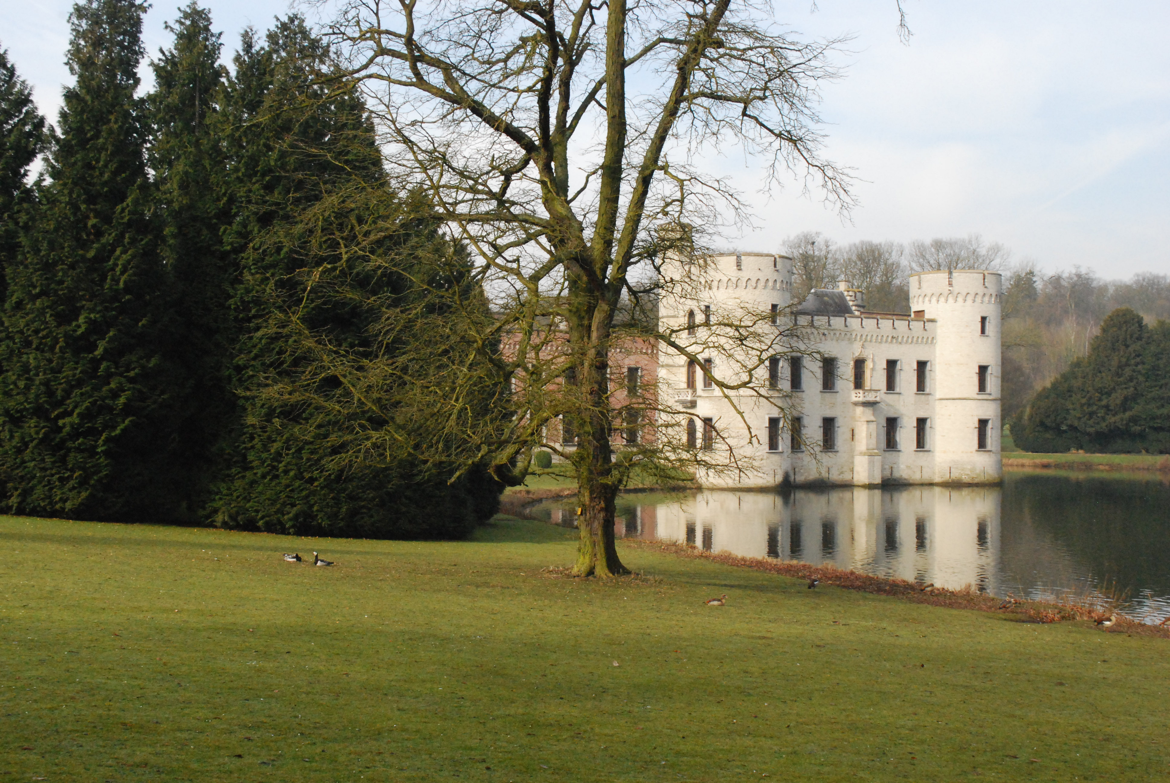 Vue du Jardin Botanique National de Meise.